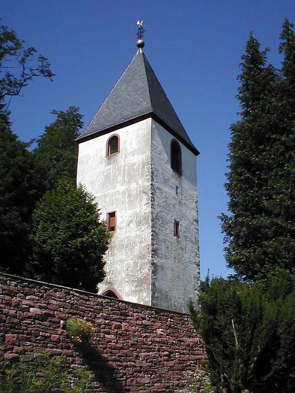 „Alter Turm“ in Bammental, Rest der ersten Kirche des Ortes